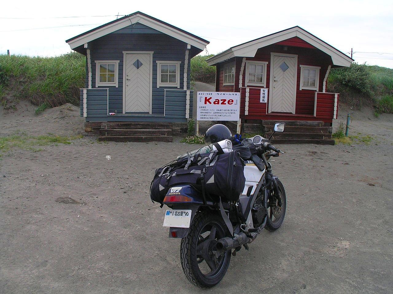 石狩市石狩浜、小さい角ログによるキャビンタイプのライダーハウスKAZE